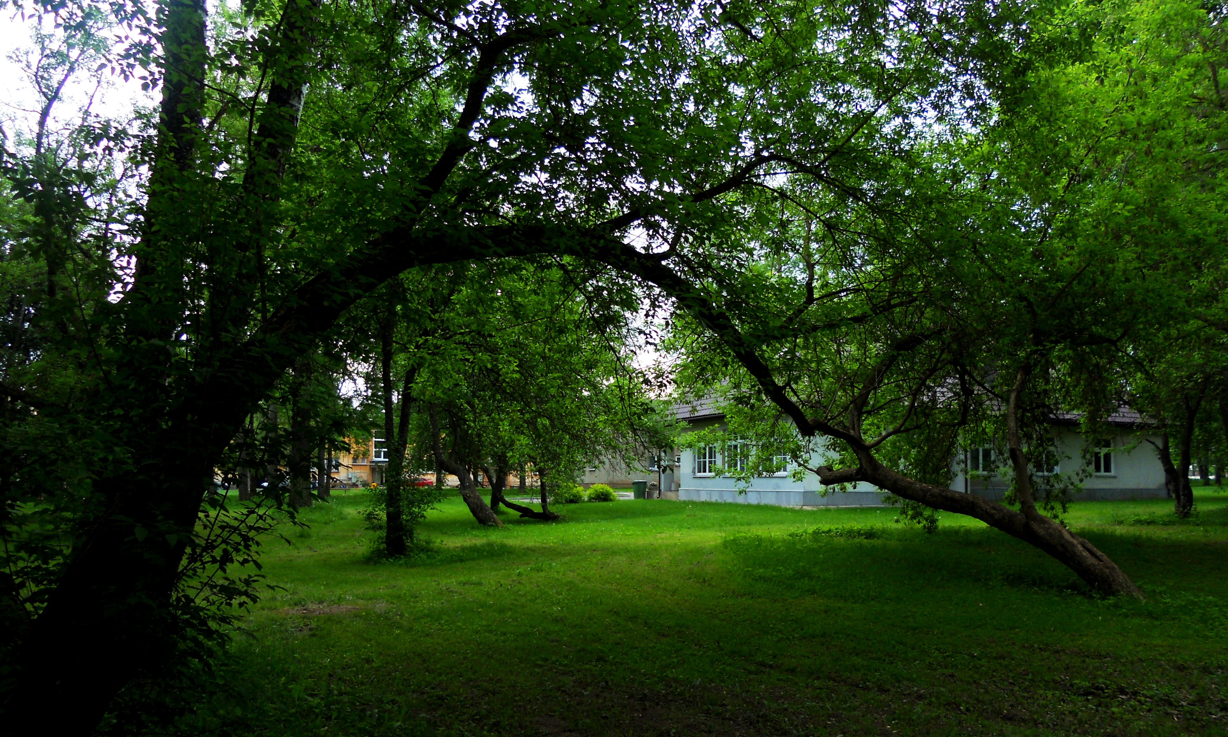 Ülenurme park